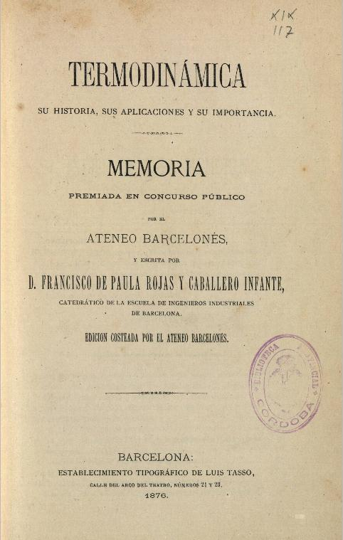 Portada libro Termodinámica: su historia, sus aplicaciones y su importancia. Estab tip. Luis Tasso. Barcelona, 1876.